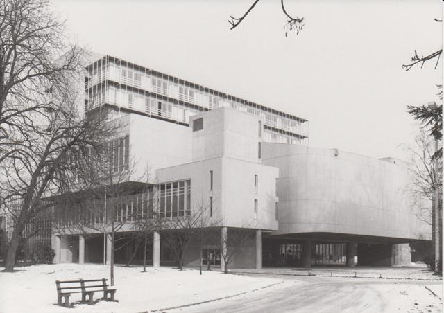 Gent Familie Van Rysselberghedreef 2 ICC